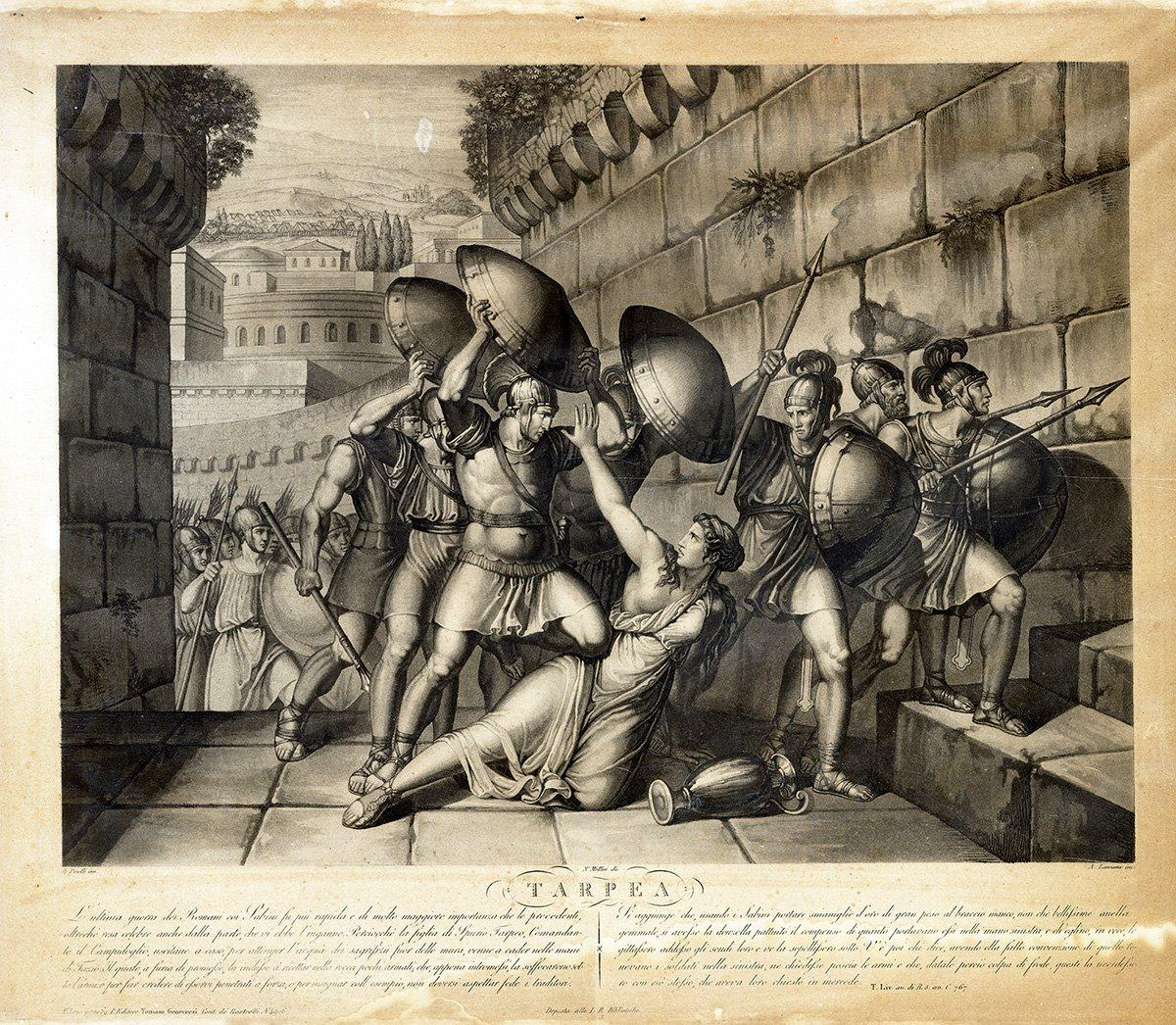 Гибель Тарпеи